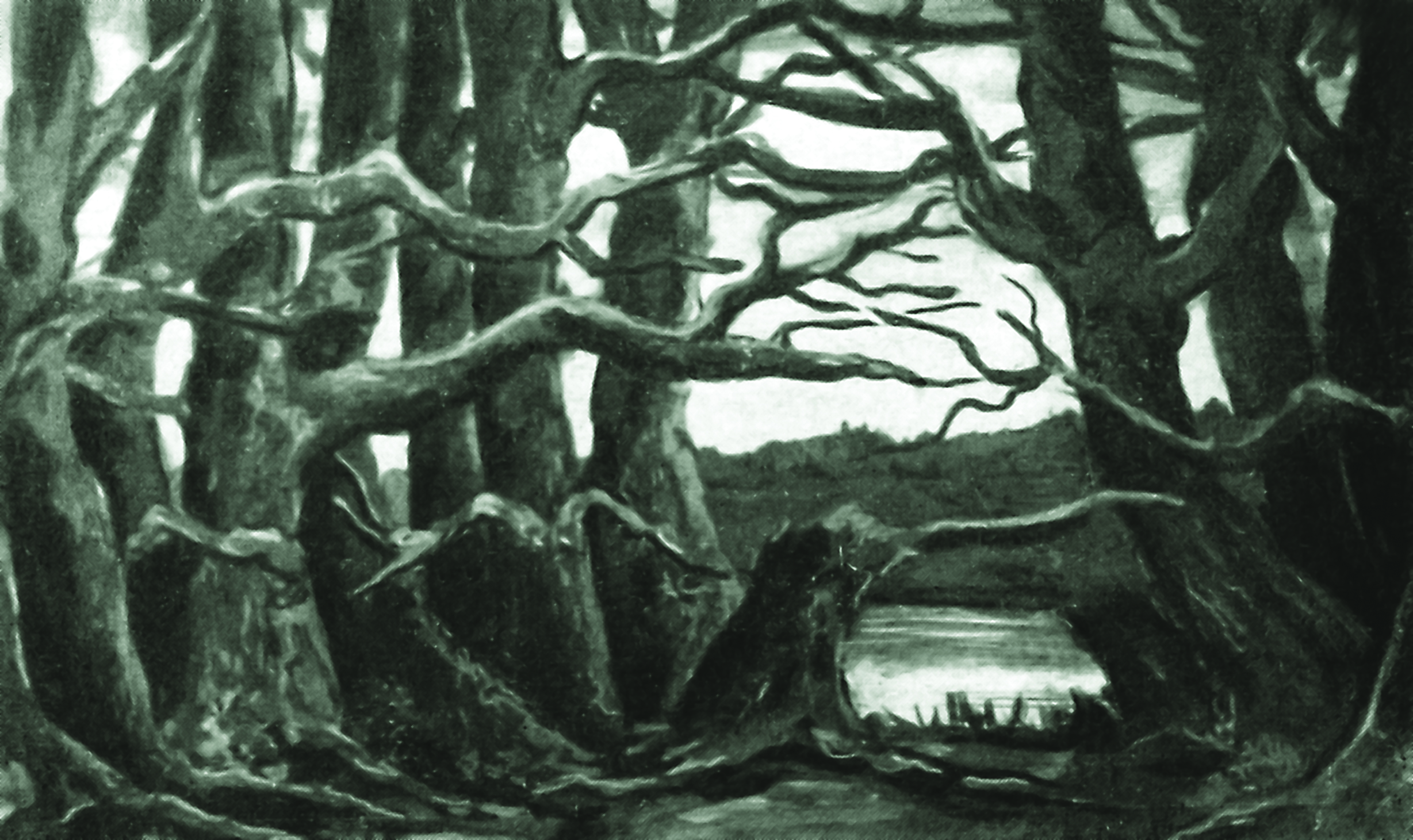 Эскиз к балету "Шурале". Молдабеков А., 1956 год